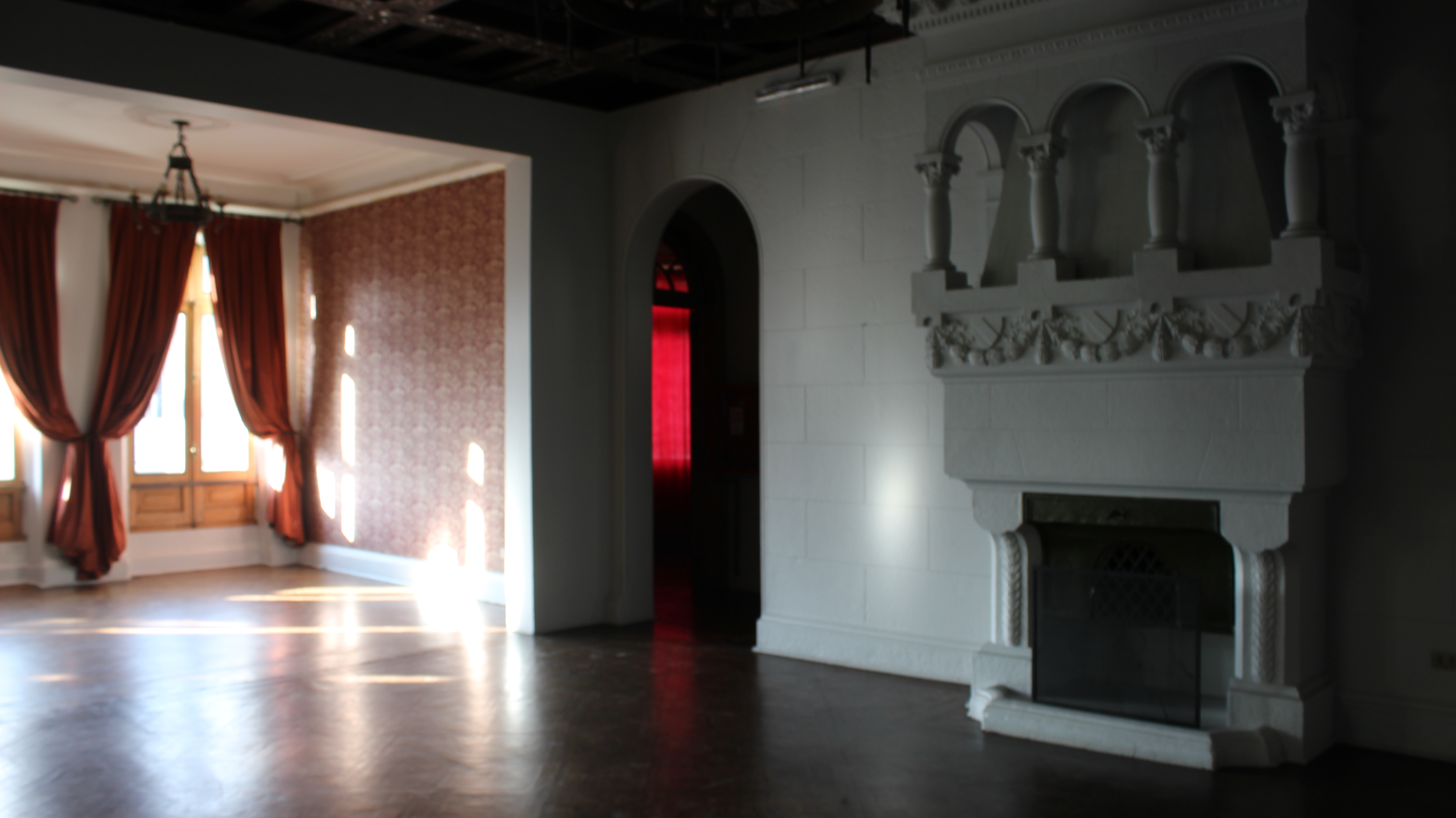 Salon principal Palacio Concha